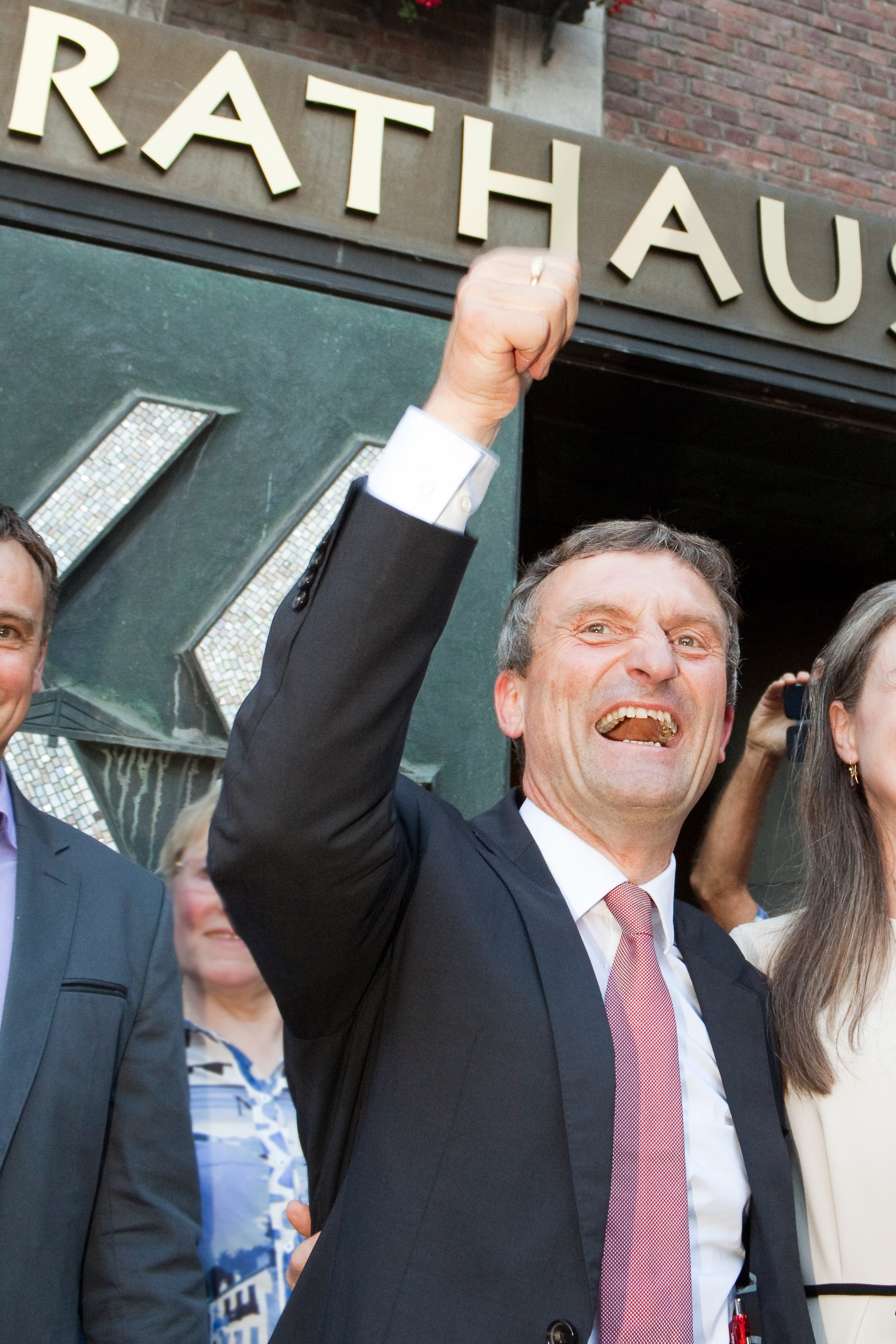 Thomas Geisel (SPD) wird Oberbürgermeister der Landeshauptstadt Düsseldorf. Aufnahme am Wahlabend vor dem Rathaus. 2014.